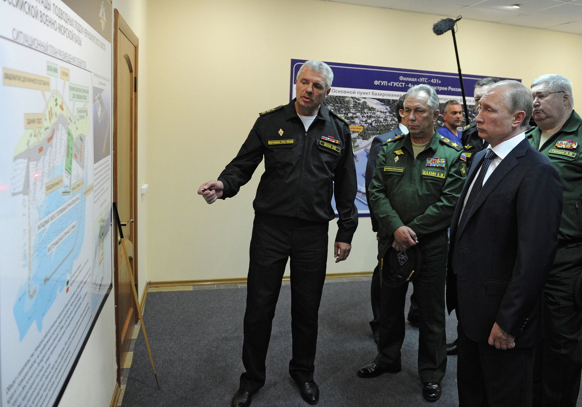 Командующий Черноморским флотом Александр Витко информирует президента России Владимира Путина о ходе строительства пункта базирования в Новороссийске